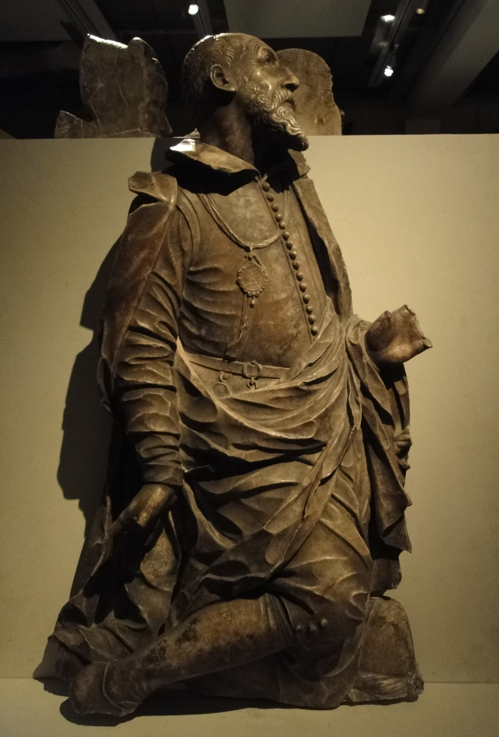 Teil des Nosseni-Epitaphs im Stadtmuseum Dresden mit der Darstellung Nossenis